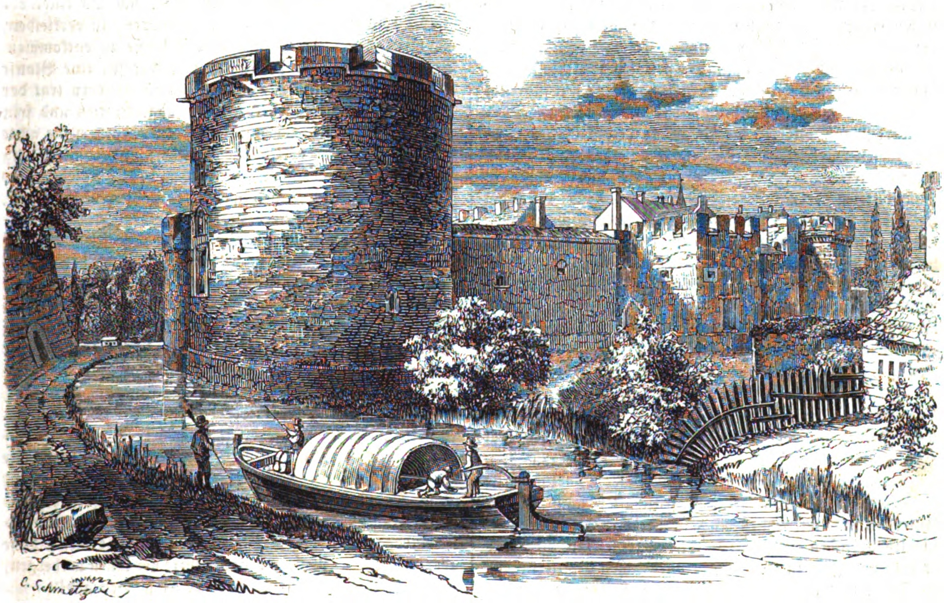 Das Staatsgefängnis in der Festung Ham (Frankreich), 1853.